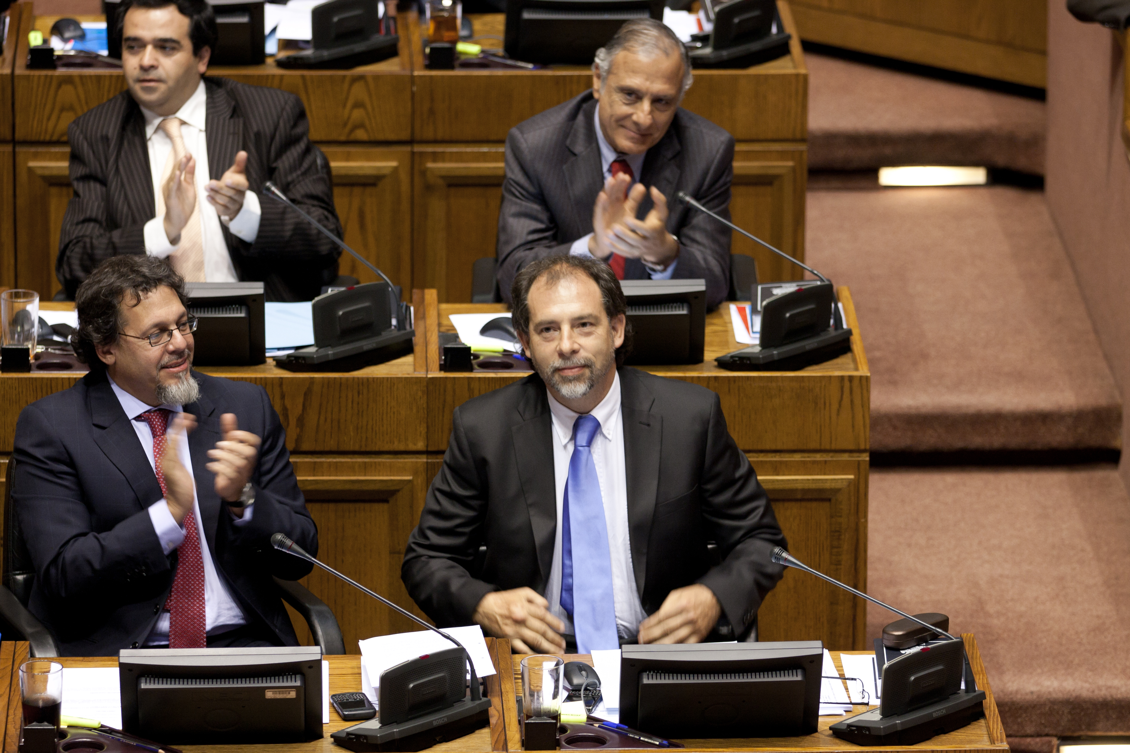 El senador estará en el cargo un año, según lo dispone el acuerdo político comprometido por la Concertación de rotar el cargo entre los partidos que la integran. Además de presidir la mesa de la corporación, forma parte de la Comisión de Derechos Humanos, Nacionalidad y Ciudadanía; y de Régimen Interior de la Cámara Alta.